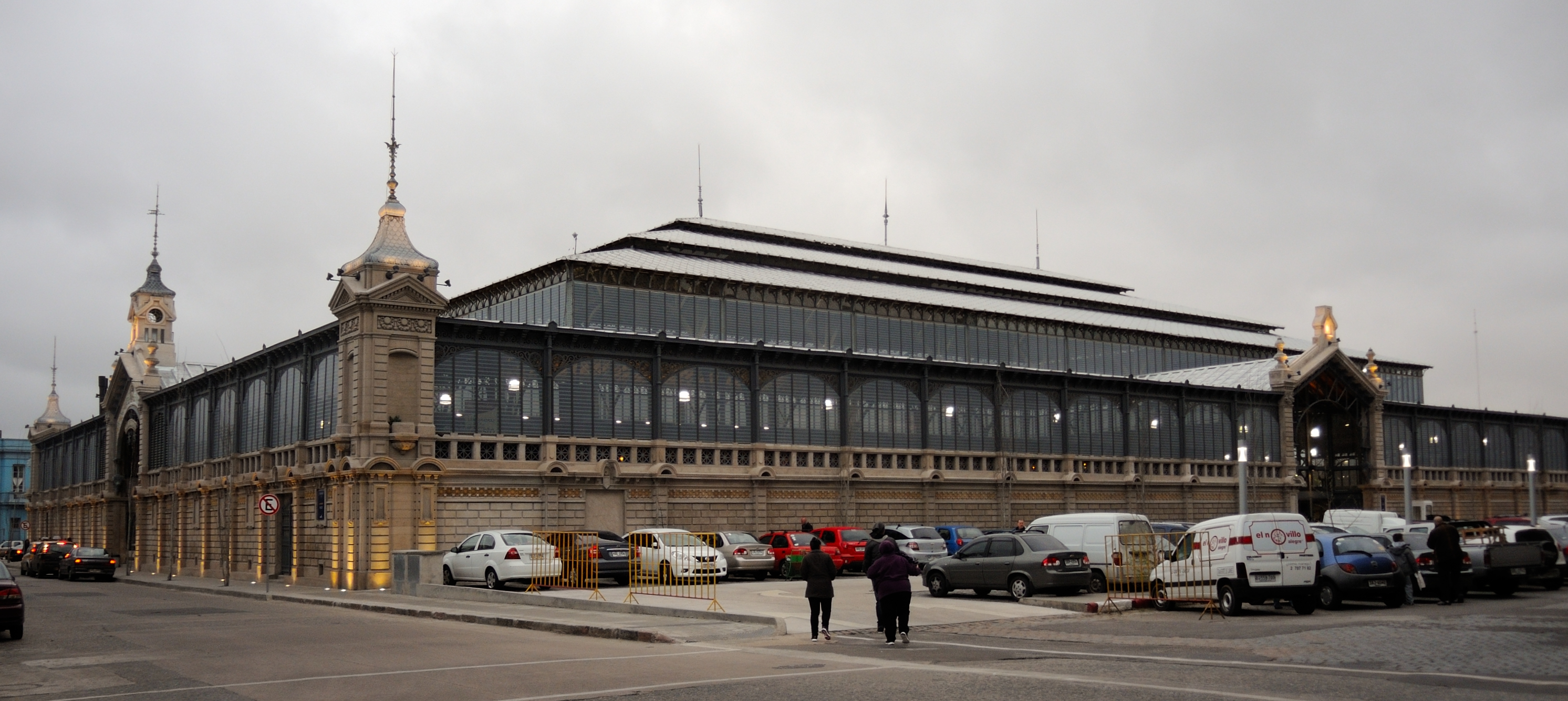 Toma en plano general del Mercado Agrícola de Montevideo desde el exterior que da a su estacionamiento.